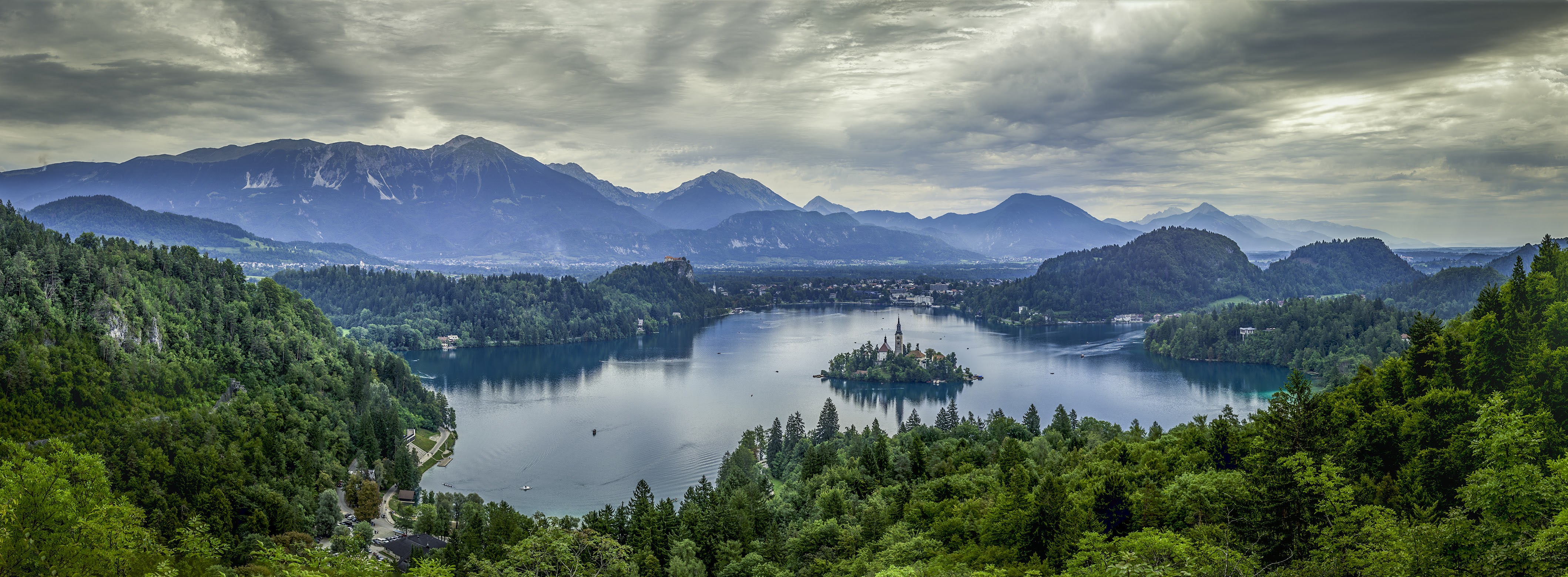 Le lac en aout 2017